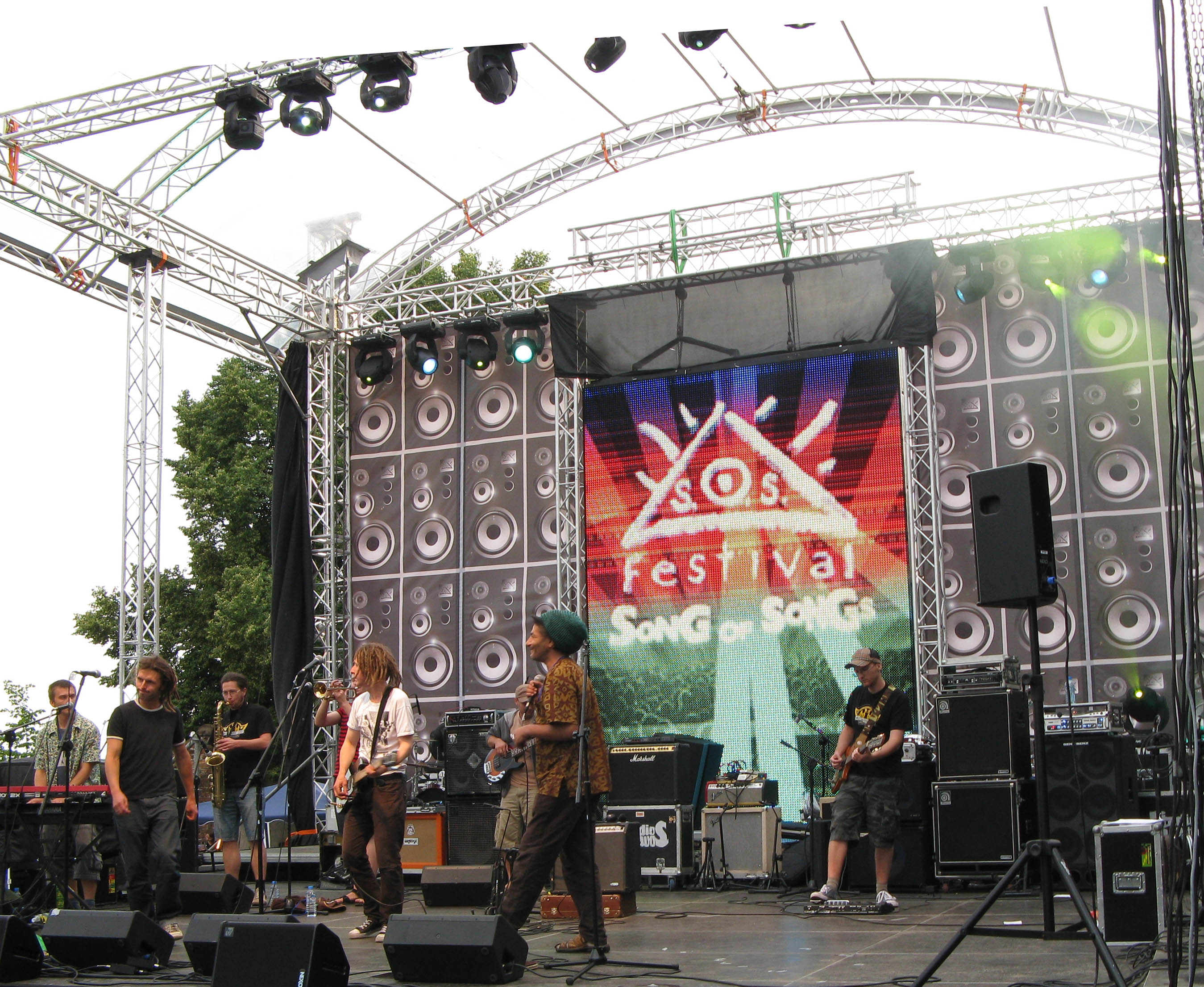 Gera Morales z zespołem Dubska na festiwalu Song Of Songs w Toruniu